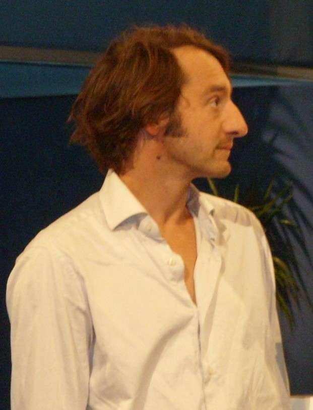 Boris Aljinovic auf der IFA 2008